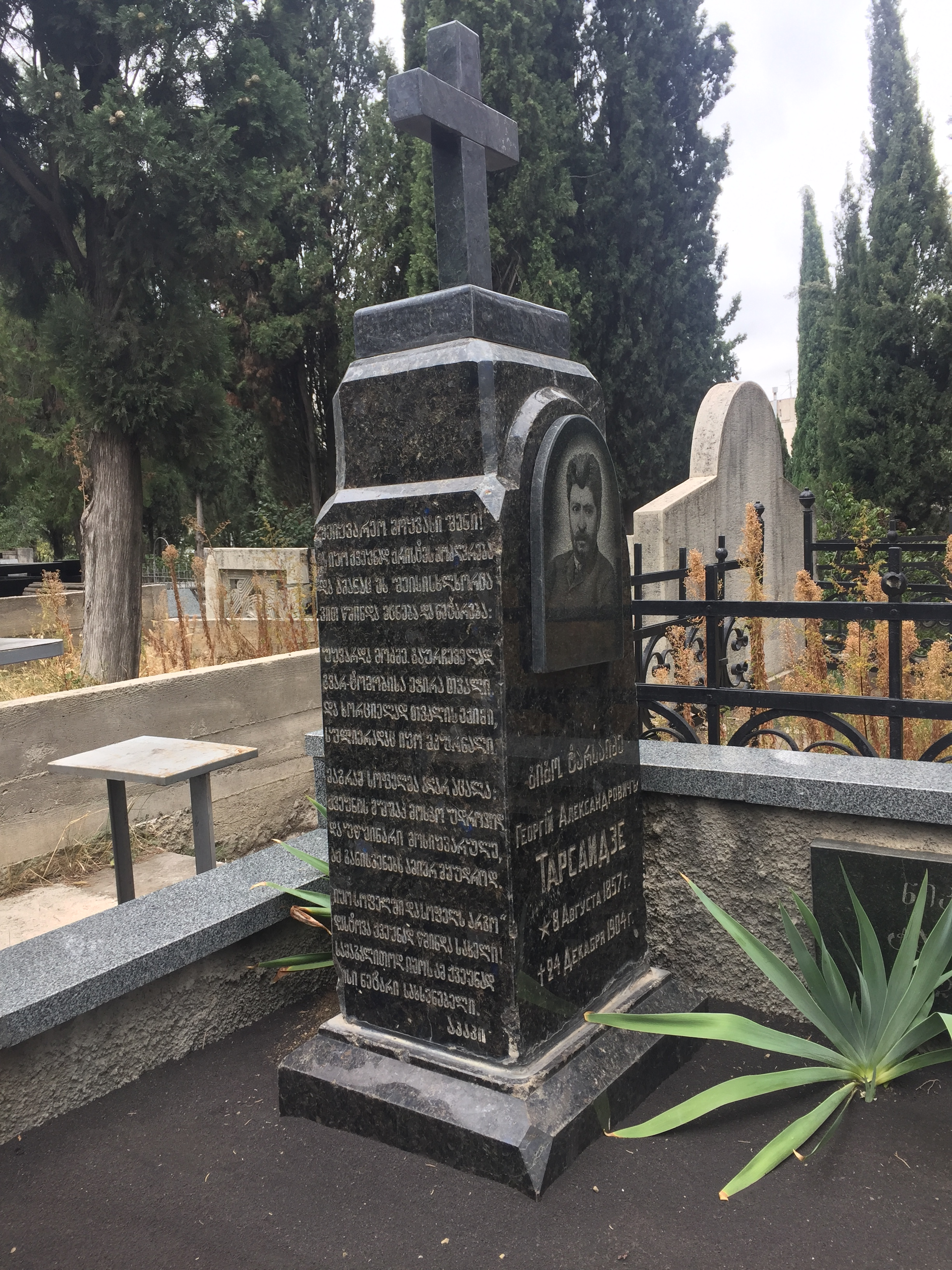 გიორგი ტარსაიძის საფლავის ქვა ვერის სასაფლაოზე